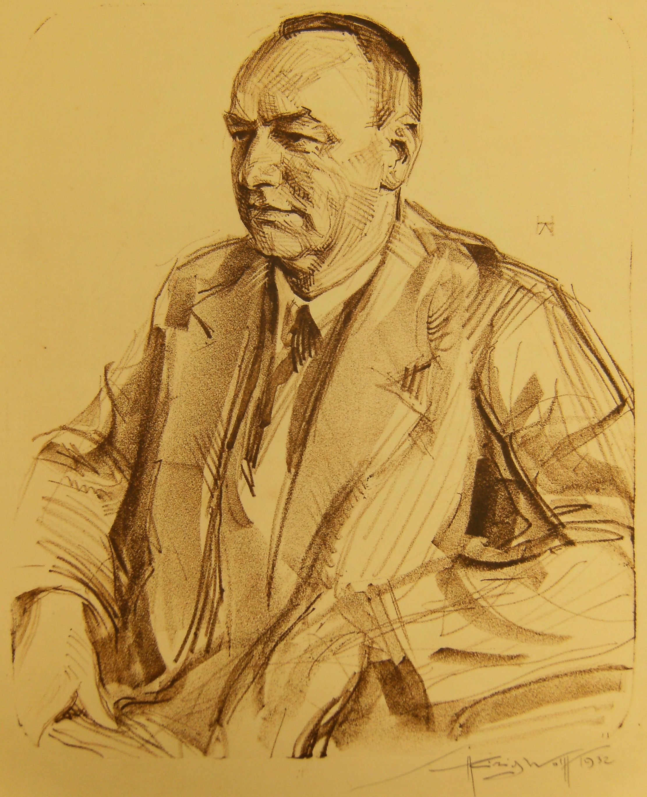 Zeichnung von Paul Blunk (1880-1947)